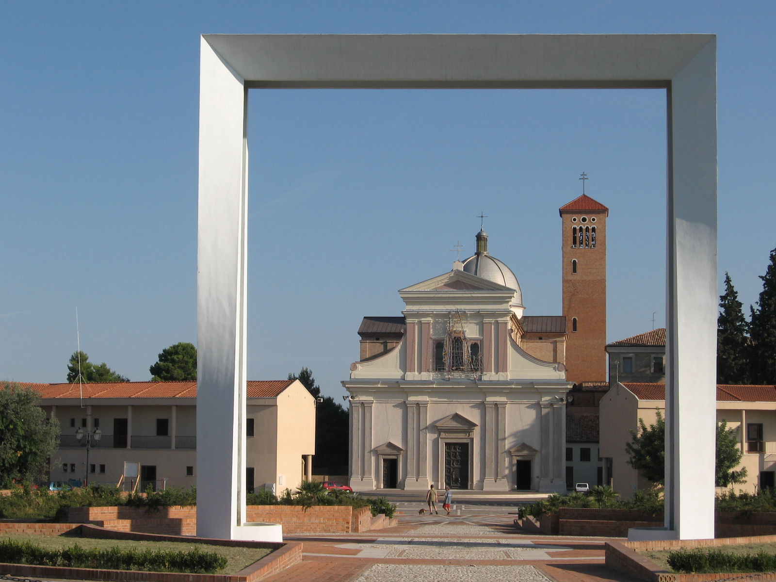 Il Santuario dei Miracoli - Fotografia scattata dall'utente Francojotti nell'agosto 2006 - Di PD ed uso assolutamente libero. Template PD